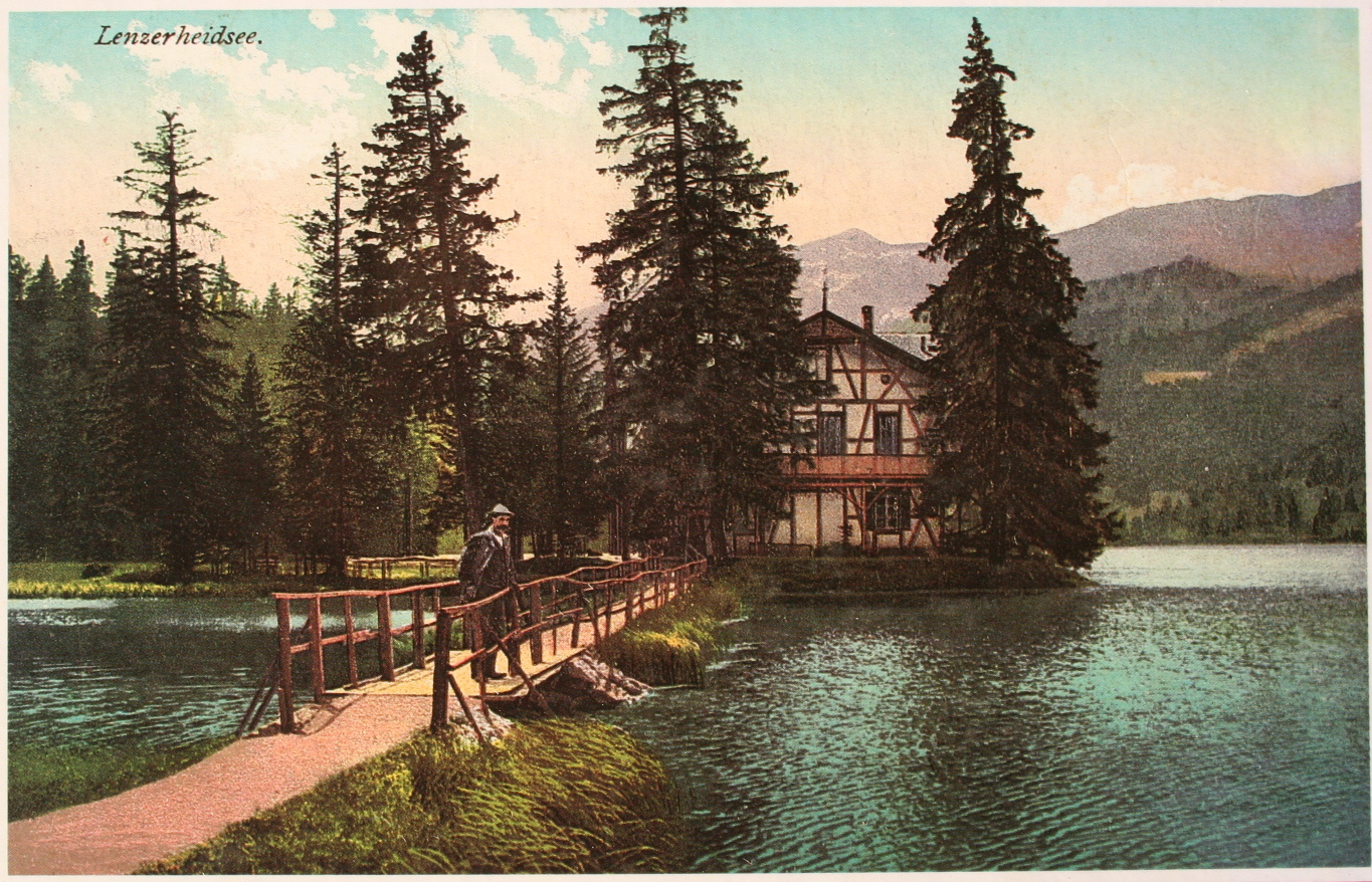 Heidsee altes Postgebäude um 1920